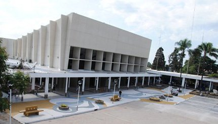 Cine Teatro Altos Hornos Zapla. Palpalá, Provincia de Jujuy. Argentina